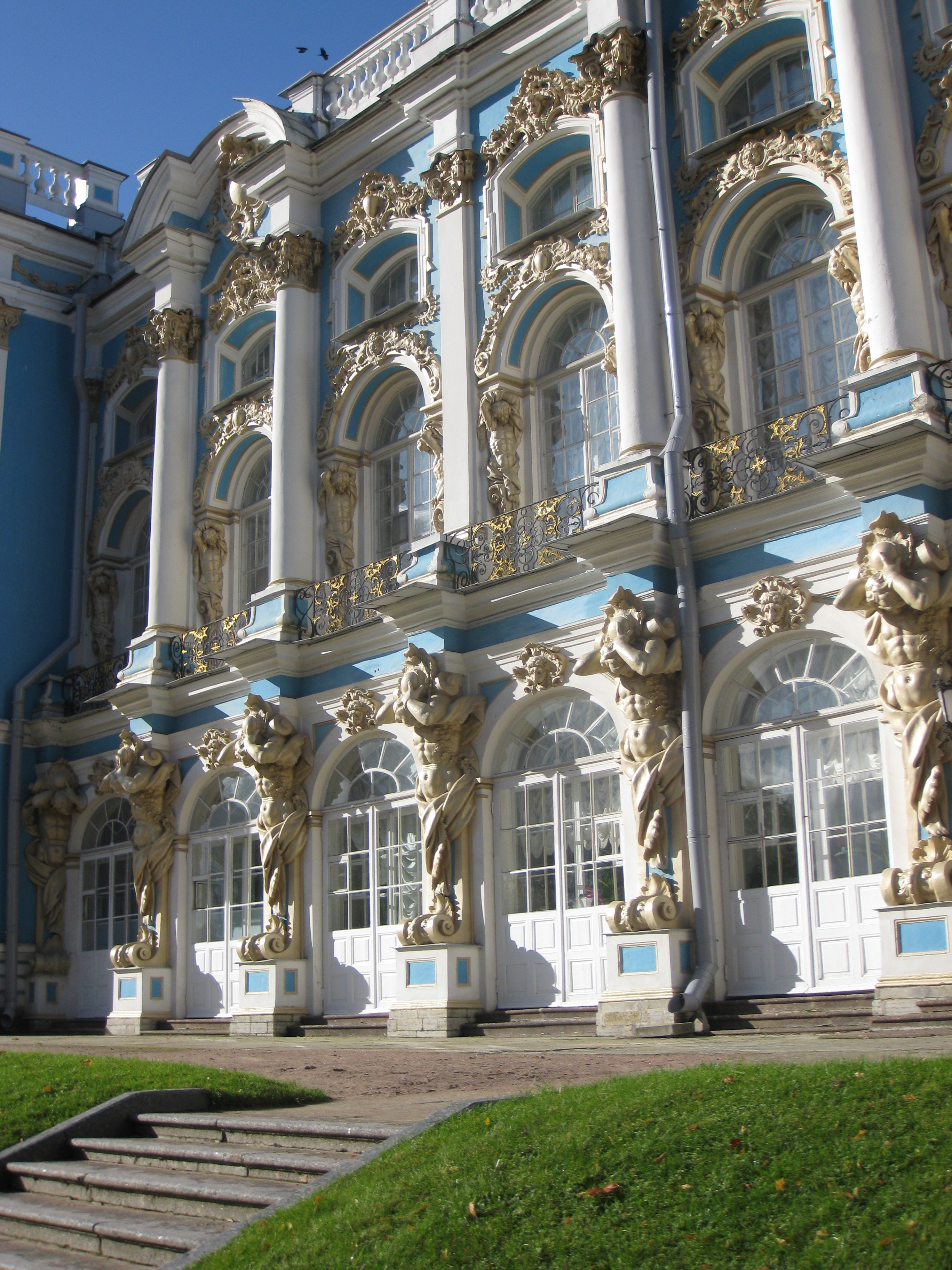 Catherine Palace ארמון יקתרינה הגדולה בפושקין